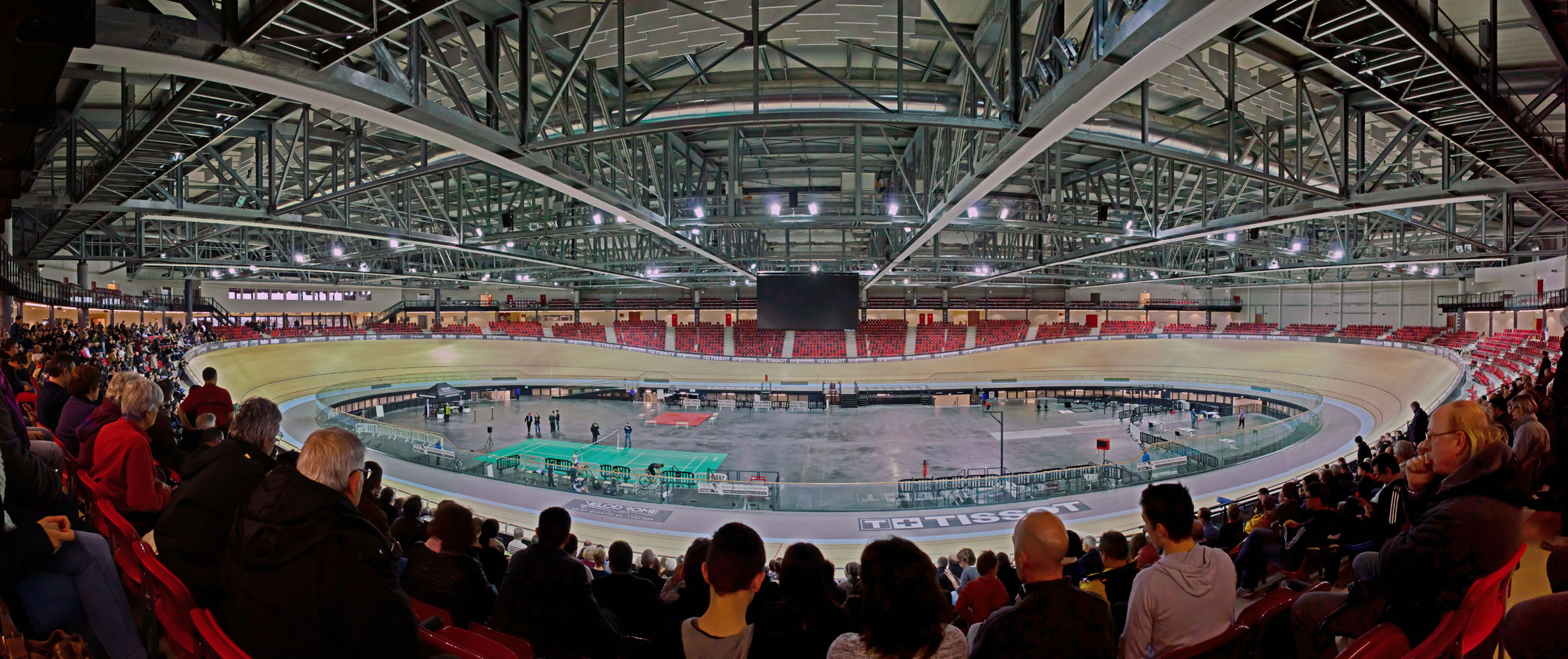 Vélodrome de Saint-Quentin-en-Yvelines, journée porte ouverte 1er février 2014